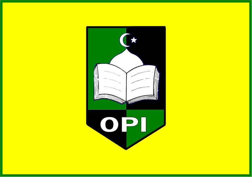 Bendera OPI